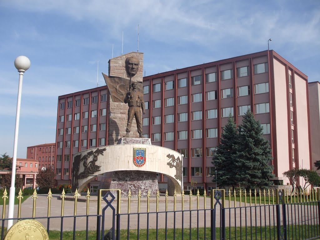 Jandarma Genel Komutanlığı binasından bir görünüm (Beştepe, Ankara), 2013.